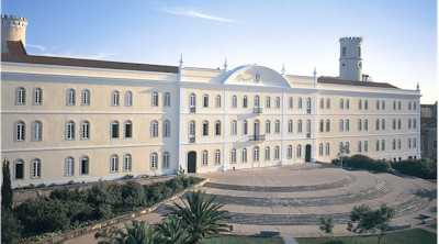 Faculdade de Economia da universidade Nova de Lisboa